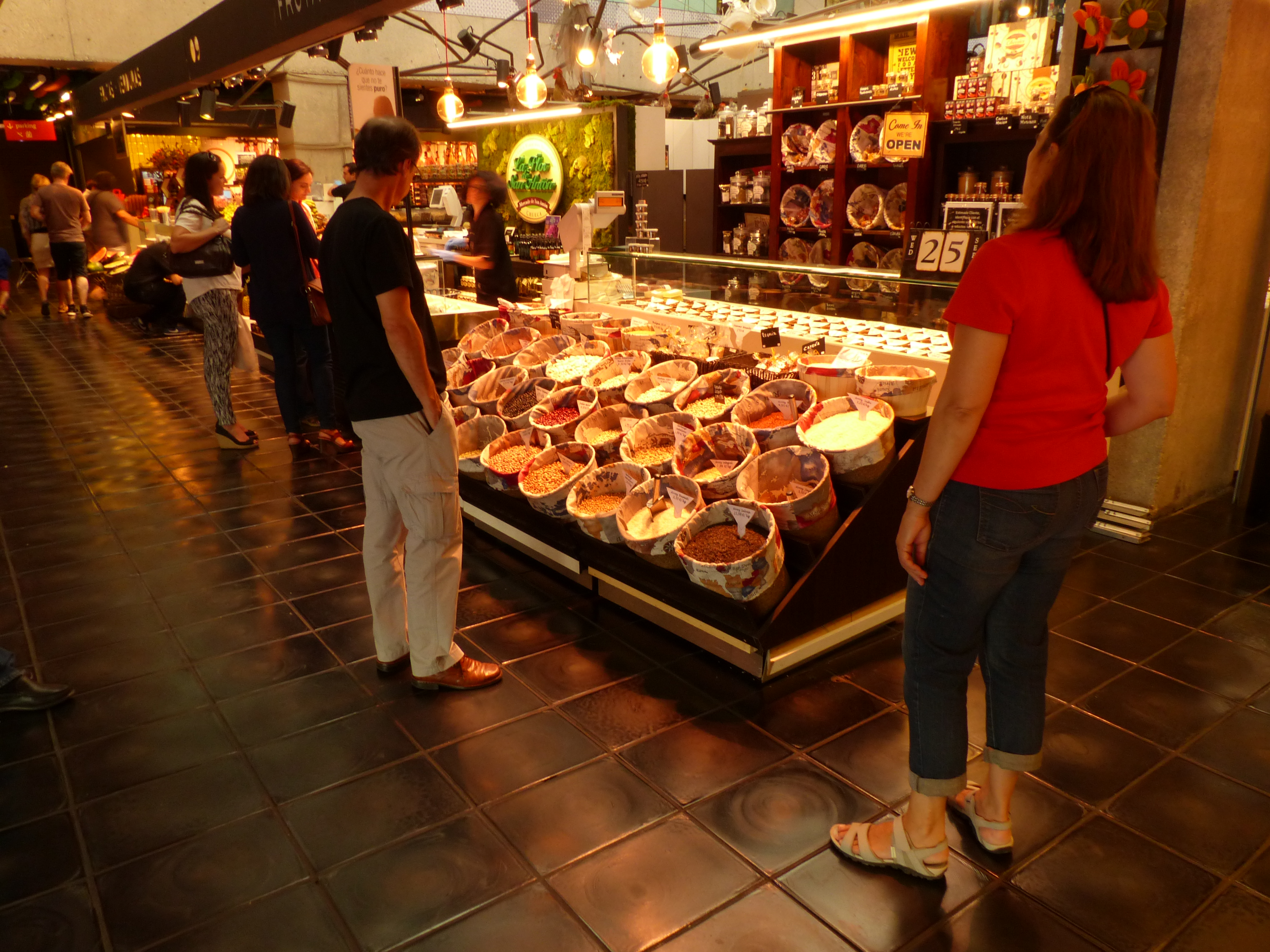 Mercado de San Antón, venta al público.